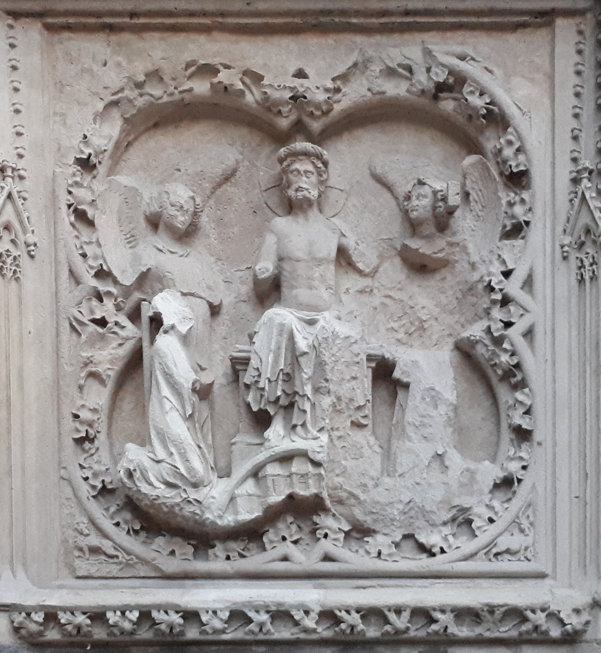 L'intercessione della Vergine.